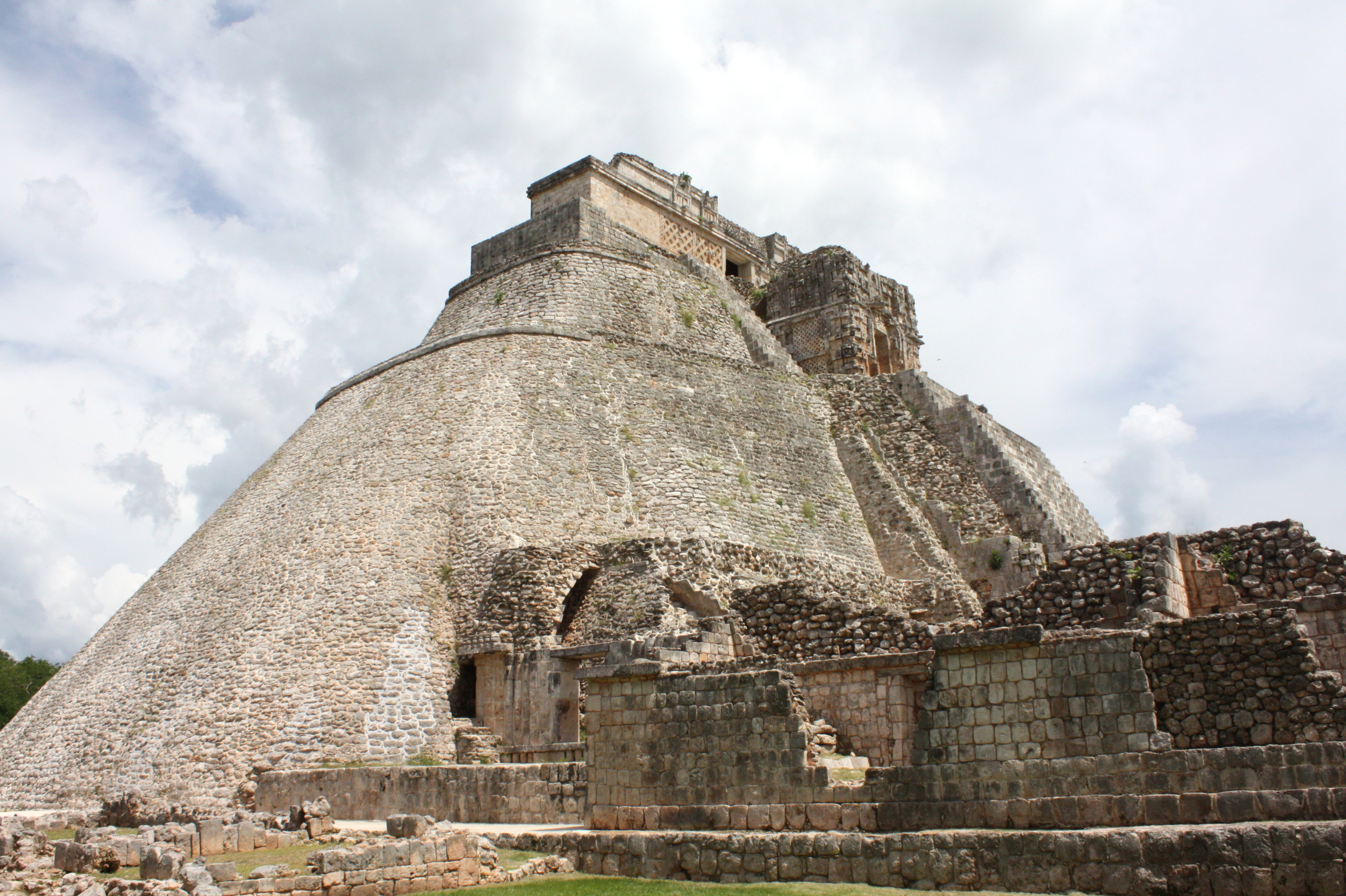 Pirámide del Adivino en Uxmal, Yucatán, vista desde el lado norte